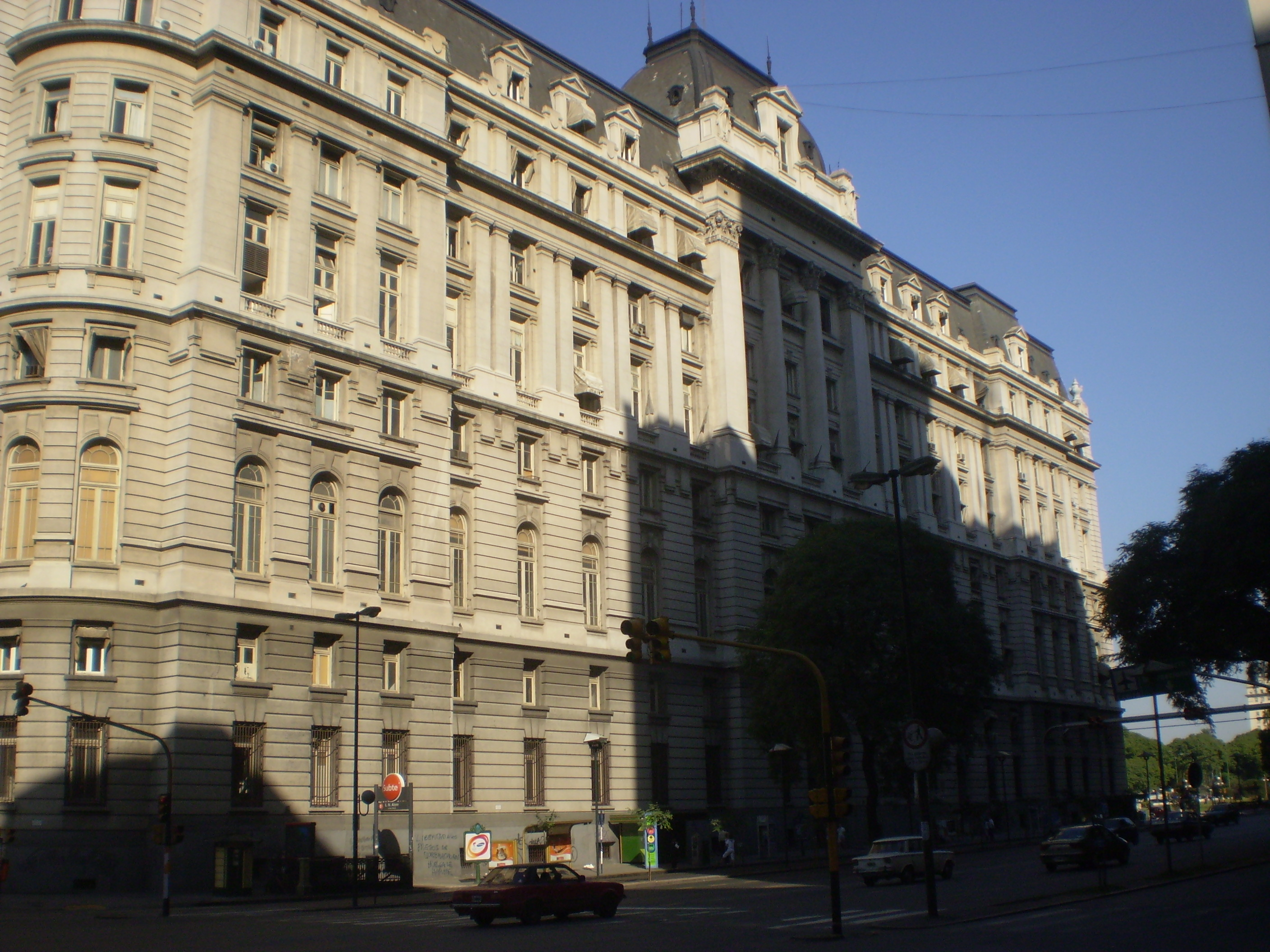 Secretaría de Comunicaciones, Buenos Aires, Argentina. Frente del edificio que da a la avenida Leandro N. Alem.